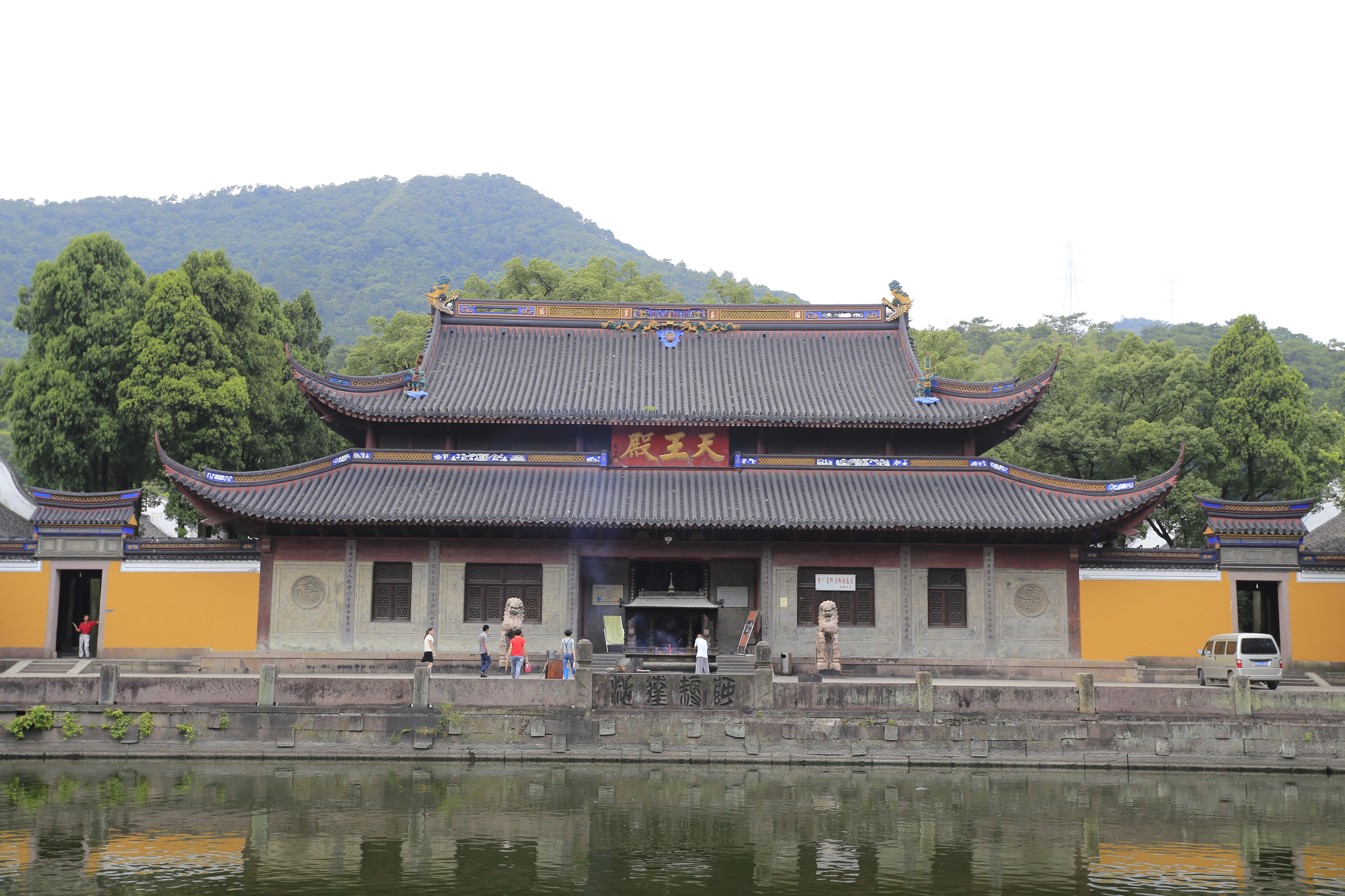 宁波阿育王寺 —— 放生池和天王殿